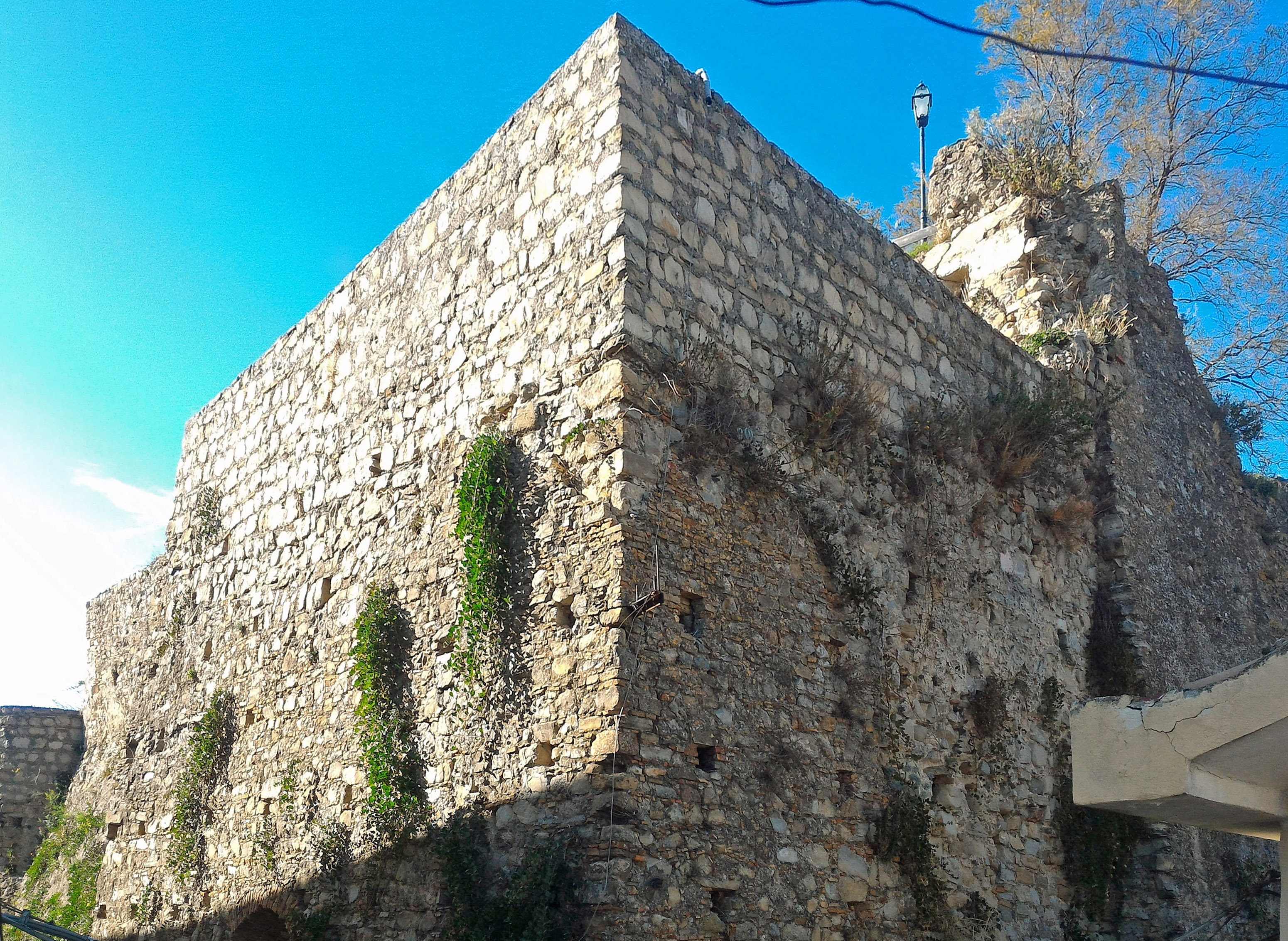 Castello del Marchese di Crucoli, Torre Normanna This is a photo of a monument which is part of cultural heritage of Italy.